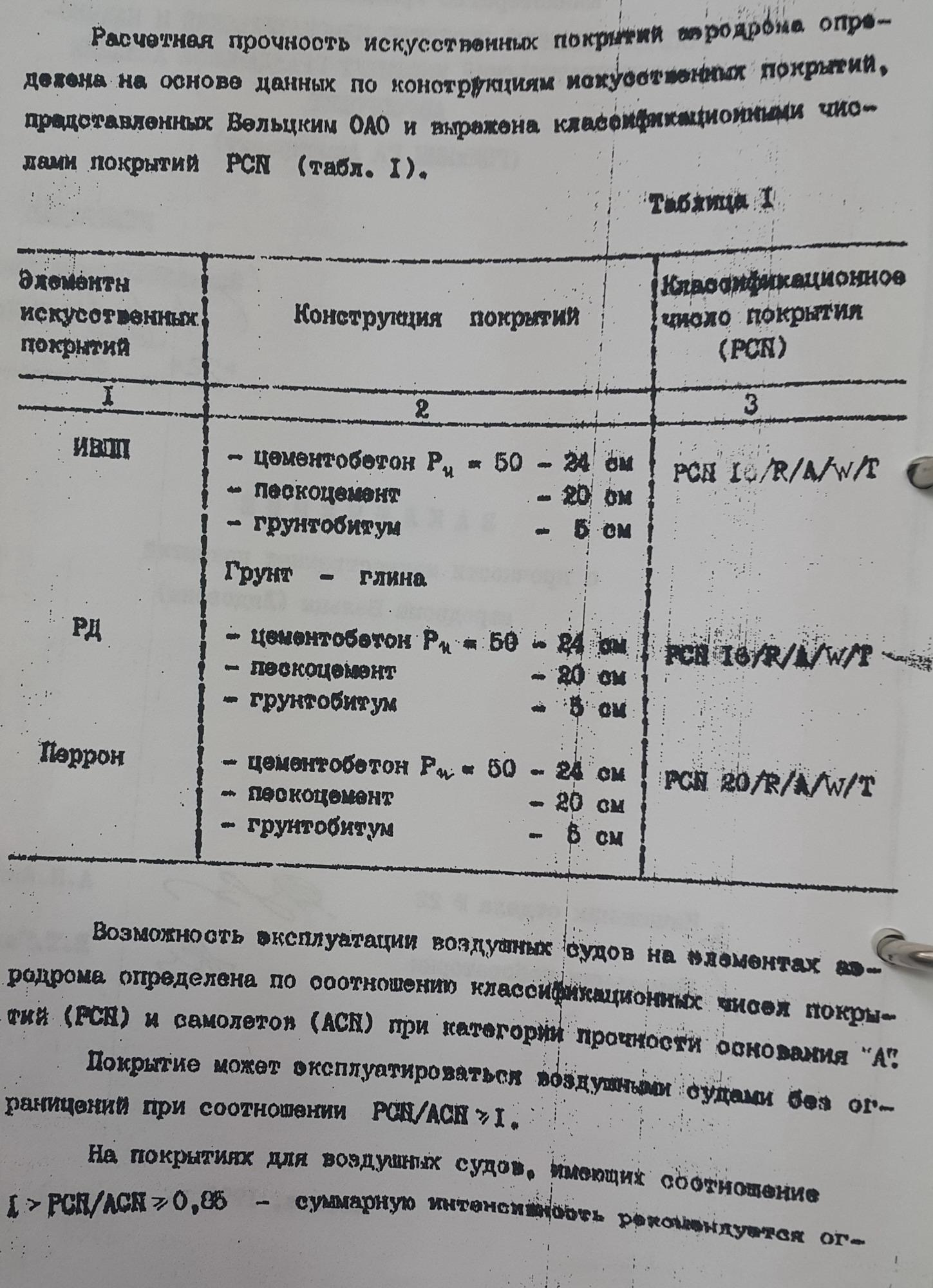 Заключение о прочности искусственных покрытий аэропорта Бельцы-Лядовены